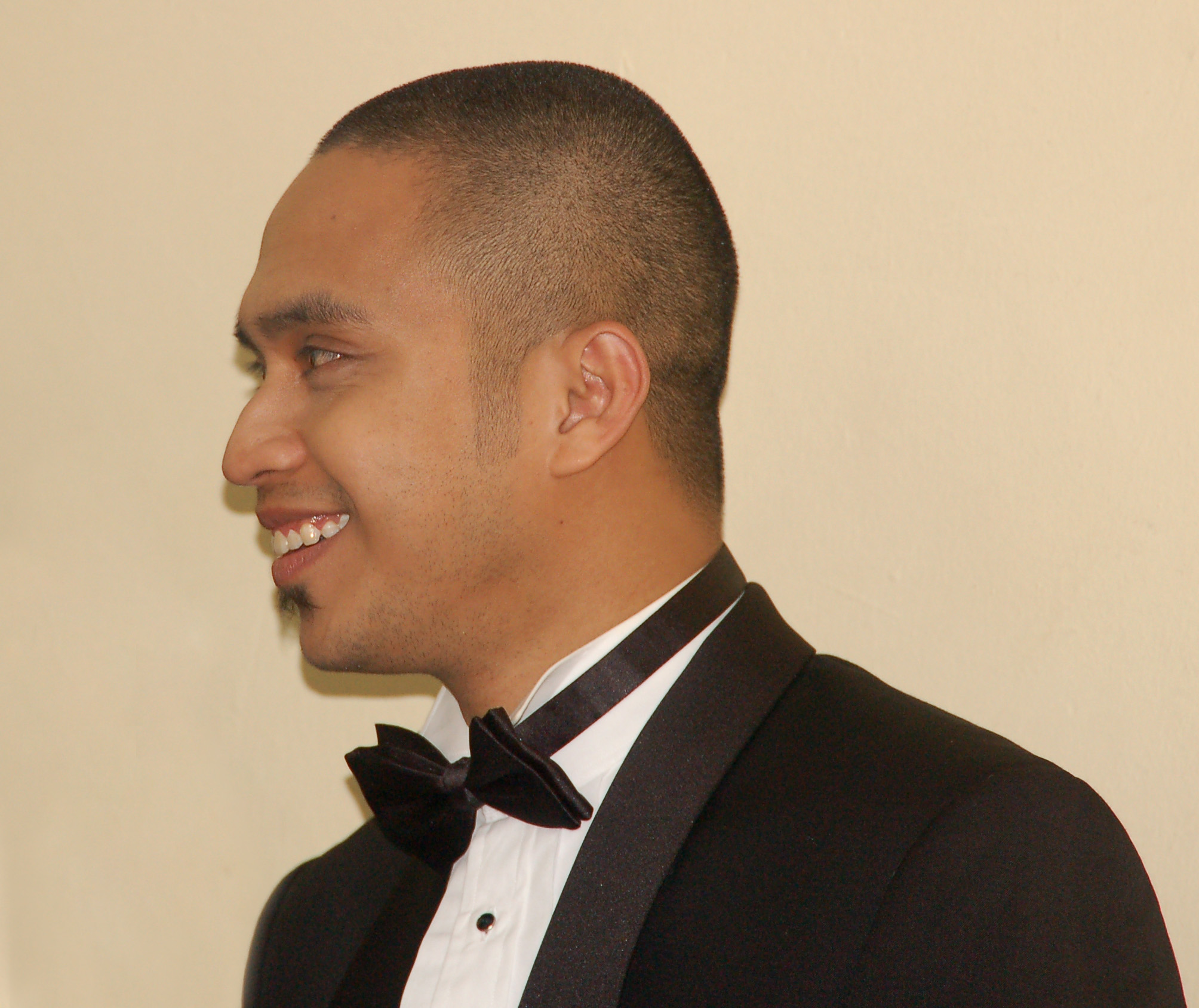 Malaysian SMS King - Mawi